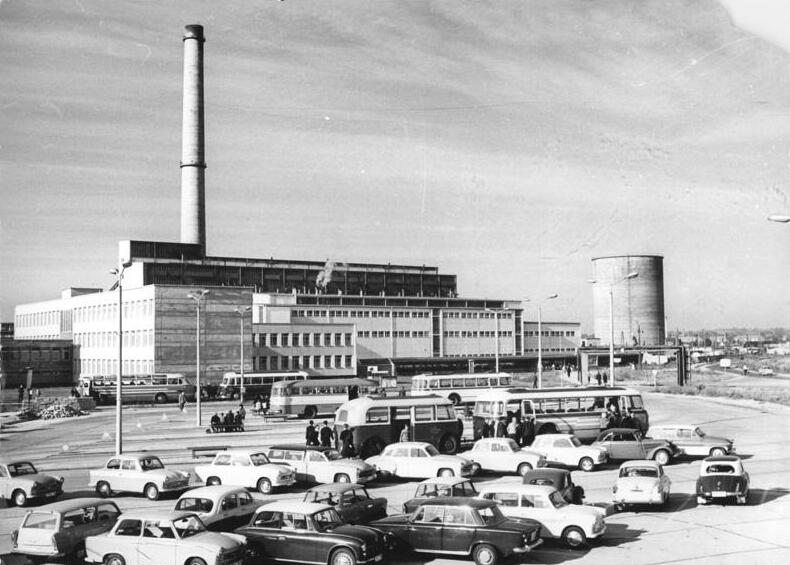 Zentralbild Großmann 22.9.1966 Im Chemiefaserkombinat Wilhelm-Pieck-Stadt Guben wird am 1. Oktober die erste Produktionsstraße in der 2. Dederonhalle den Probebetrieb aufnehmen. Nach dem Endausbau der 2. Halle können dann künfitg 5000 Tonnen Dederonfeinseide im Jahr hergestellt werden. Das sind 1000 Tonnen mehr als für beide Hallen projektiert war. Durch Rationalisierungsmaßnahmen, die bereits in Angriff genommen wurden als die zweite Dederonhalle noch im Aufbau war, konnte diese Mehrleistung erzielt werden. Im Hintergrund unseres Fotos ist das Kraftwerk des Chemiefaserkombinates zu erkennen.